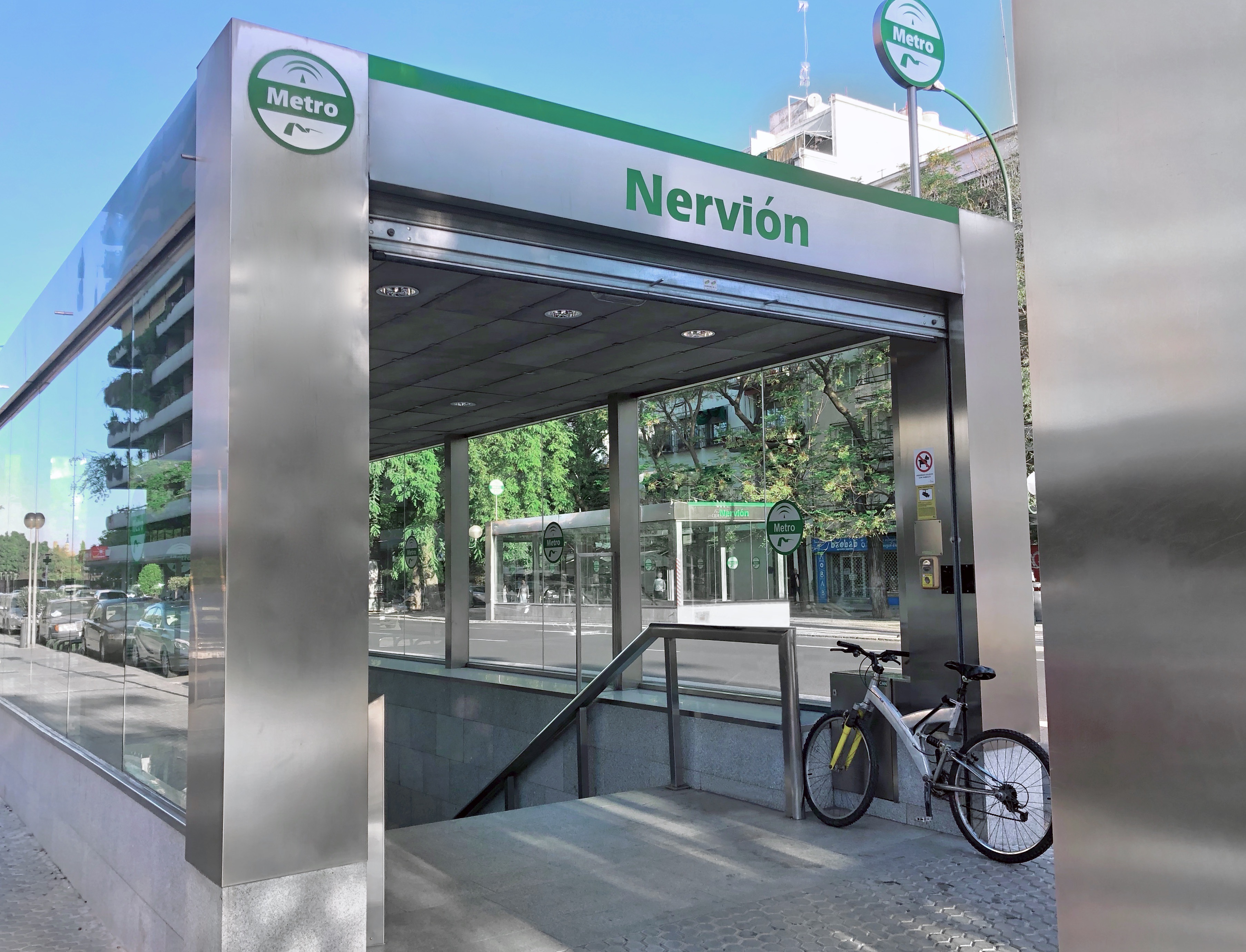 Acceso a la estación de Nervión del Metro de Sevilla